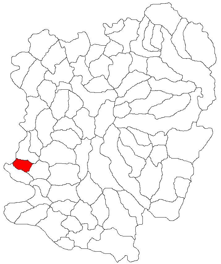 Categorie:Hărţi ale judeţului Caraş-Severin